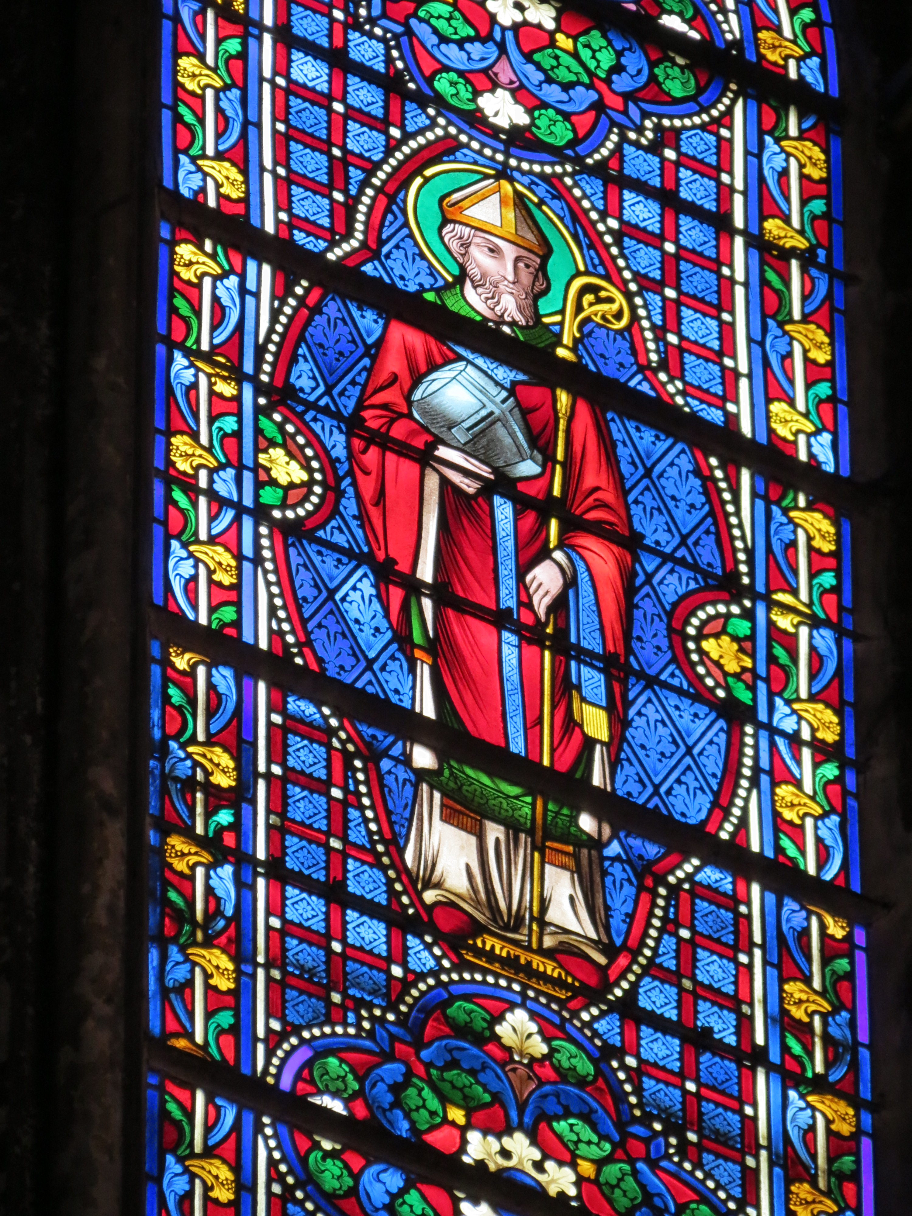 Vitrail de la basilique de Bonsecours représentant Saint-Victrice.